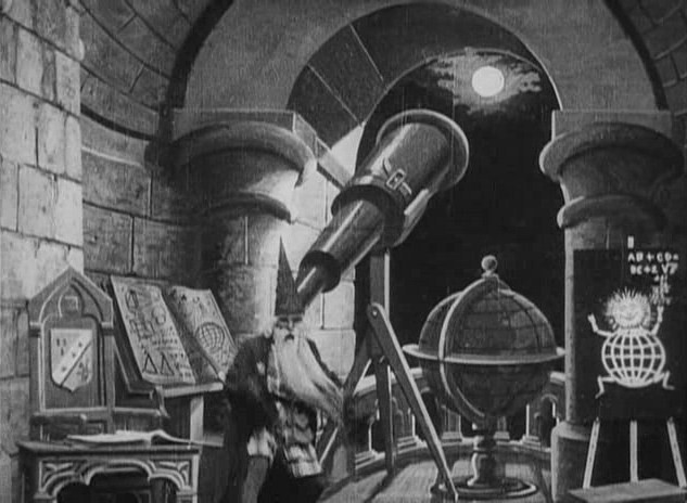 Méliès, La lune à un mètre (Star Film 160-162, 1898) 01